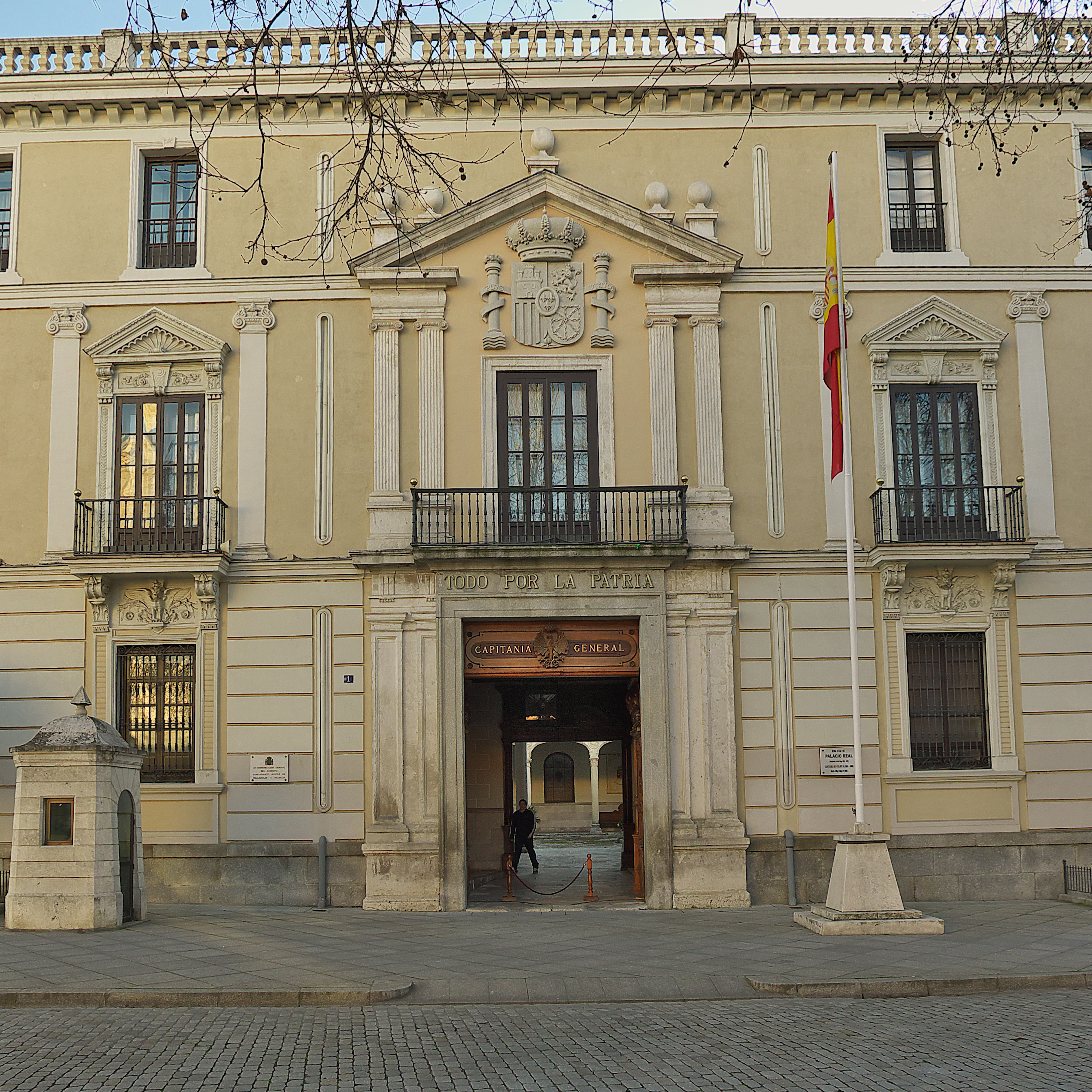 Francisco Manuel de los Cobos y Luna (1546-1616) contrata a Francisco de Mora para la remodelación de la fachada principal del palacio, siendo ejecutada por Pedro de Mazuecos (1592)